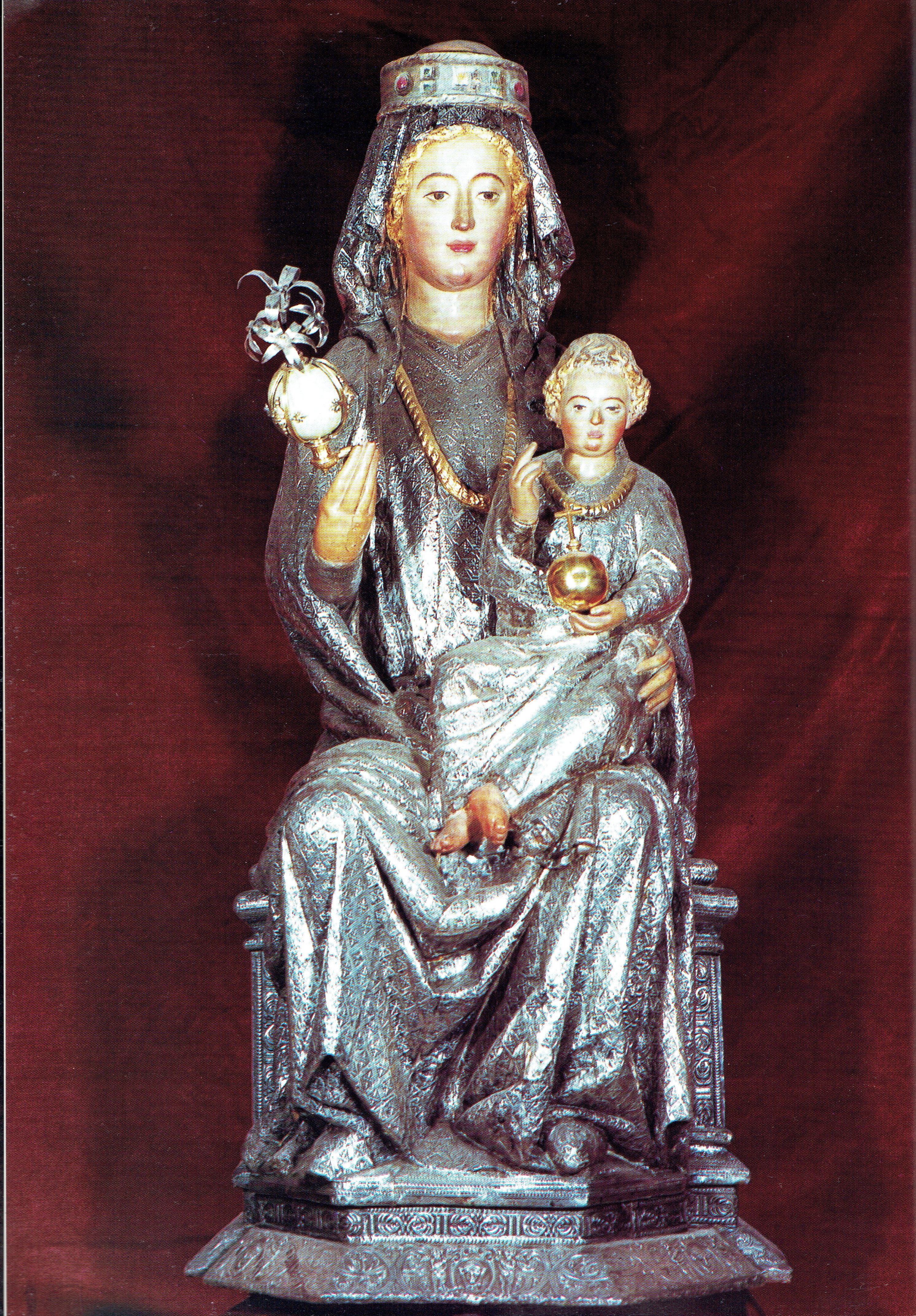 Virgen de la Sede, en el retablo mayor de la catedral de Sevilla, (España). Esta escultura, que está colocada en el centro del banco del retablo, es de estilo gótico y manifiesta una clara influencia francesa. Además, está forrada con láminas de plata, y según algunos autores debió ser tallada en el siglo XIII.